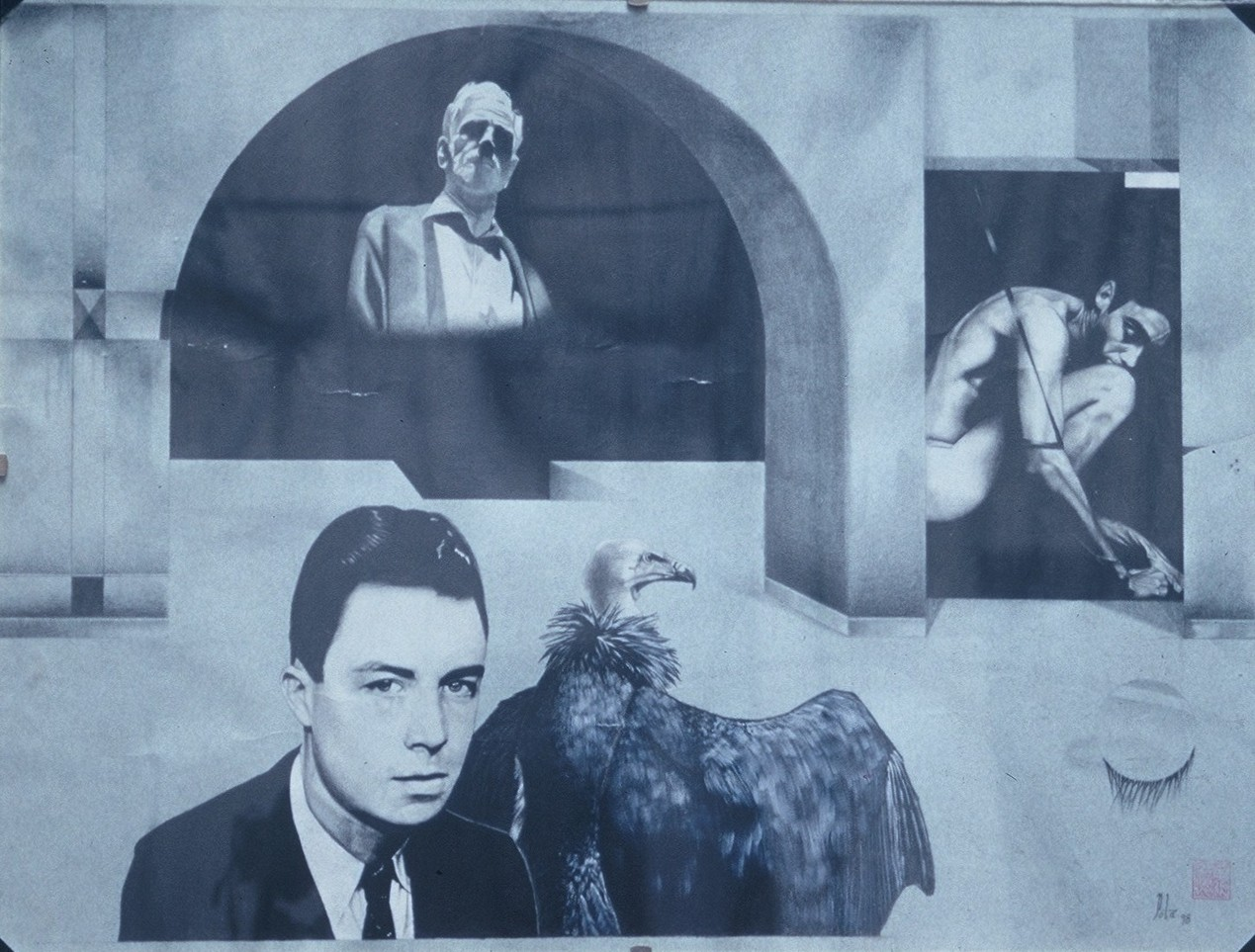 Drawing